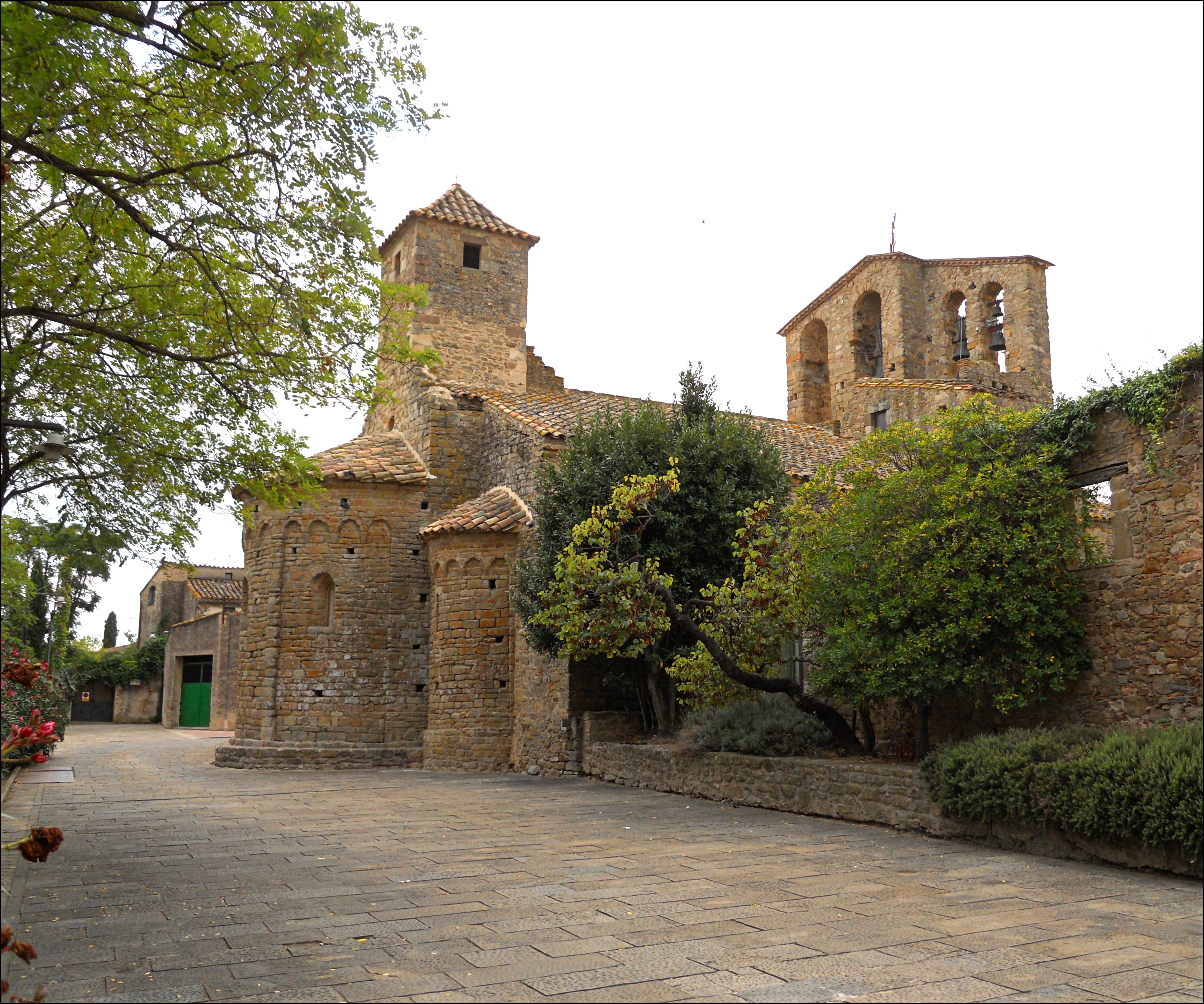 Eglise d'Ullastret (1)